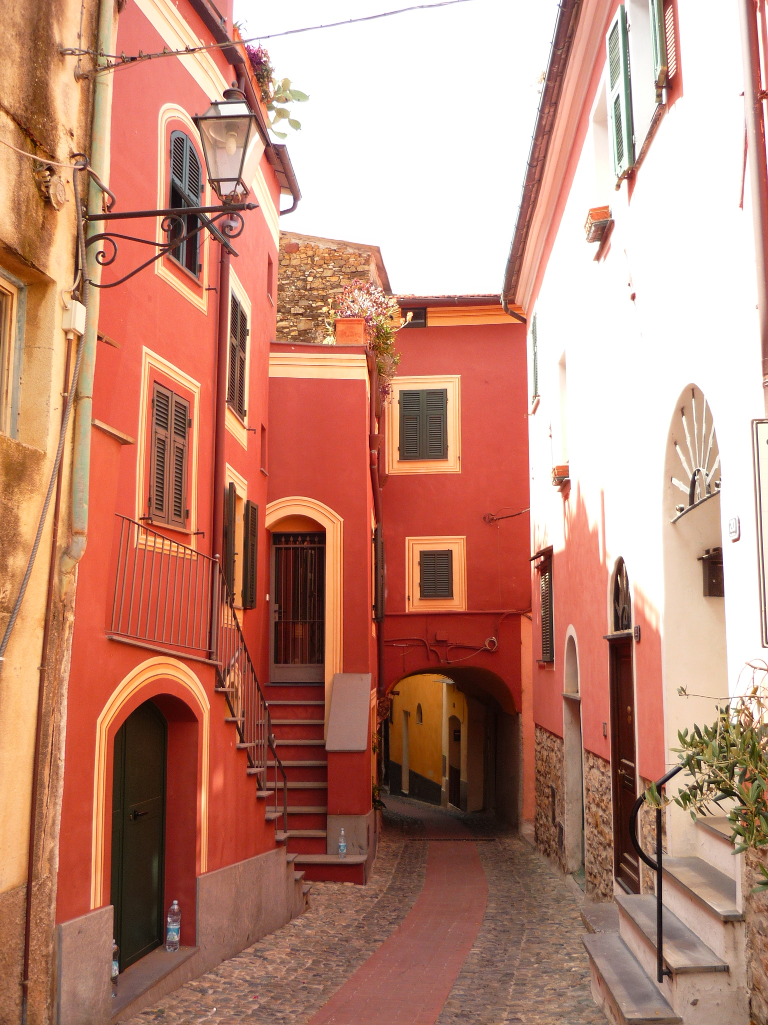 Civezza